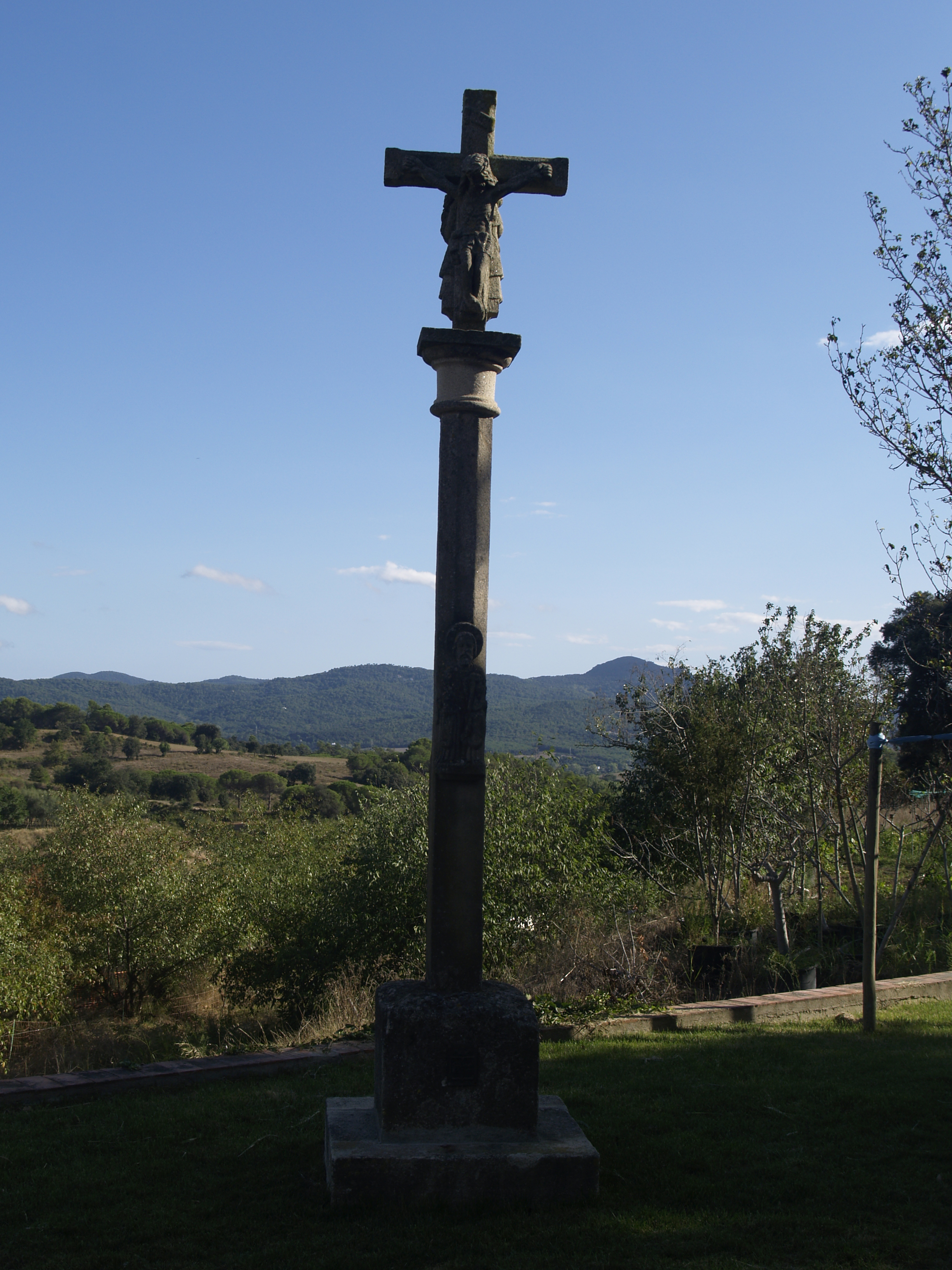 Cruz en la entrada al recinto del Castillo de Bell-lloc